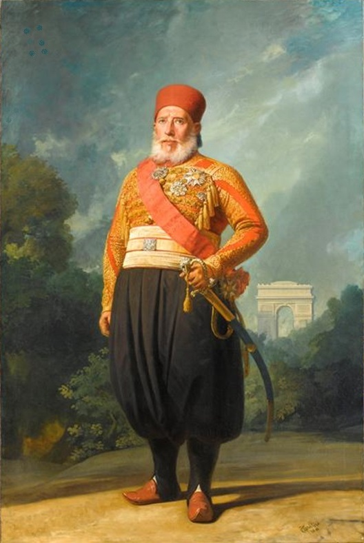 Devant une vue de l'arc de triomphe de l'Etoile portant le grand cordon et la plaque de Grand Croix de la légion d'Honneur décerné par Louis-Philippe, pendant son séjour à Paris, en juin-juillet 1846.